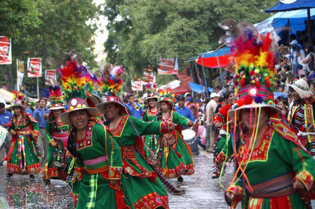 Het Carnaval van Oruro, Bolivia, het staat sinds 2001 vermeld op de Lijst van Meesterwerken van het Orale en Immateriële Erfgoed van de Mensheid van UNESCO.